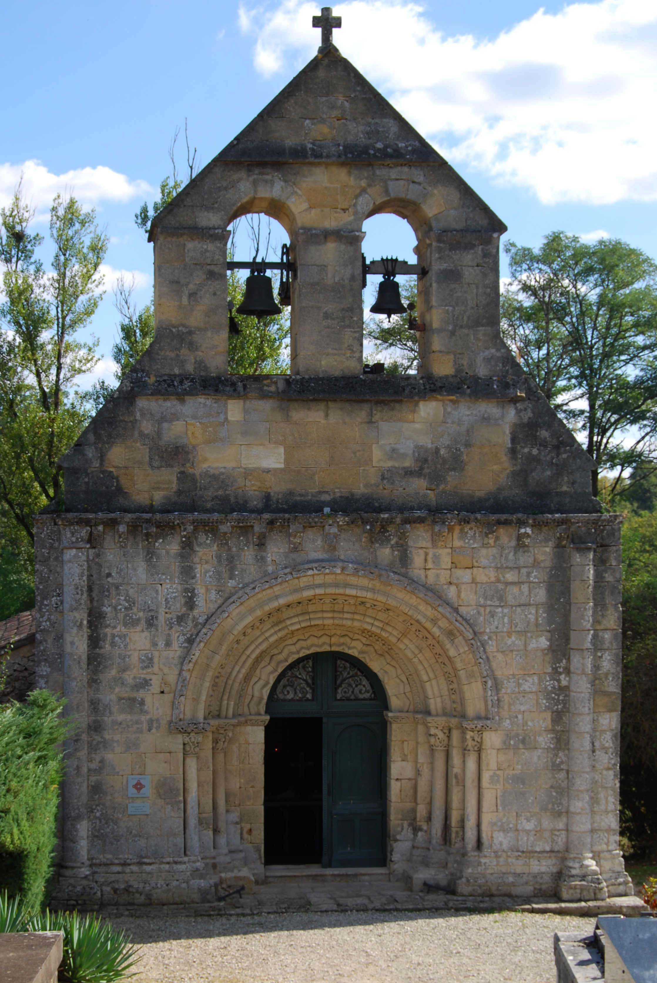 Église Saint-Genès de Saint-Genès-de-Lombaud, (Classé, 2004) .